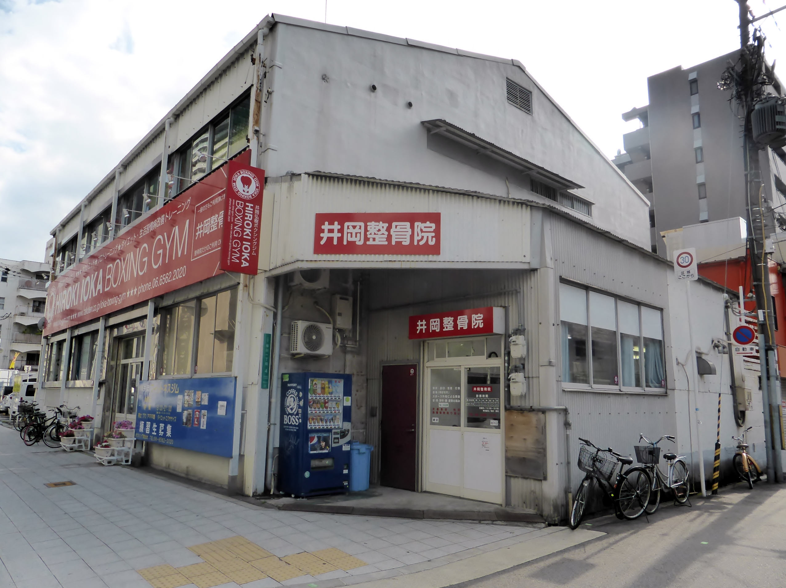 井岡弘樹ボクシングジム及び井岡整骨院を撮影。